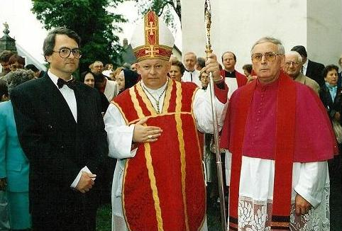 Der ehemalige Bischof von St. Pölten Dr. Kurt Krenn